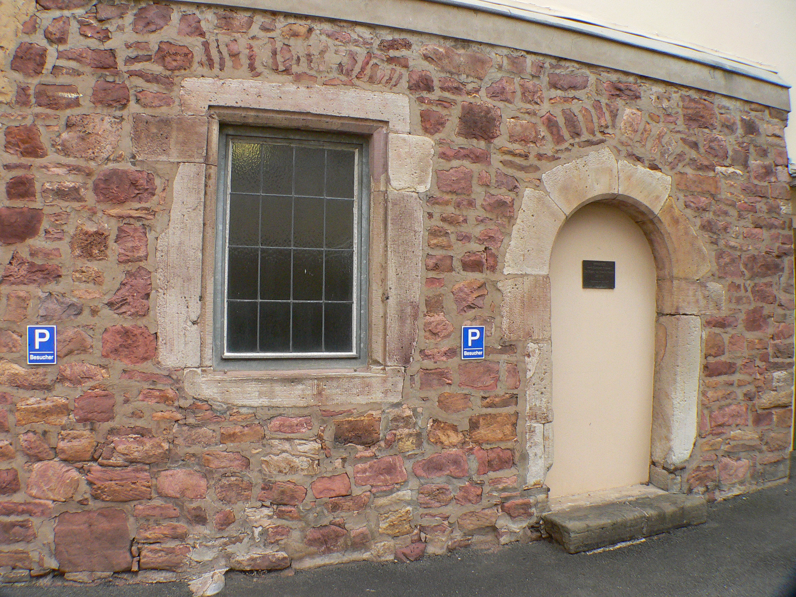 Rest der Alten Burg, erbaut 1431 in Veckerhagen (Reinhardshagen), Weserbergland, Hessen